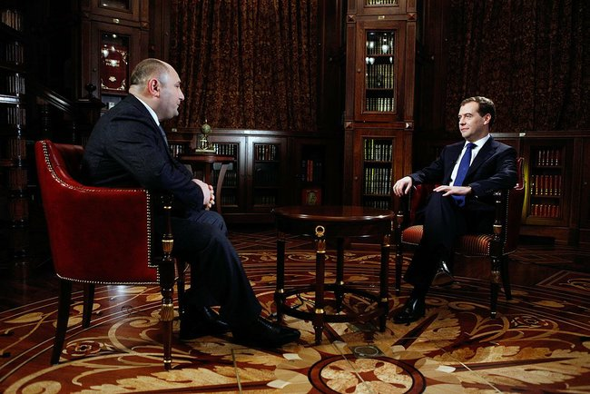 Интервью Медведева азербайджанскому телевидению и радиовещанию AzTV.